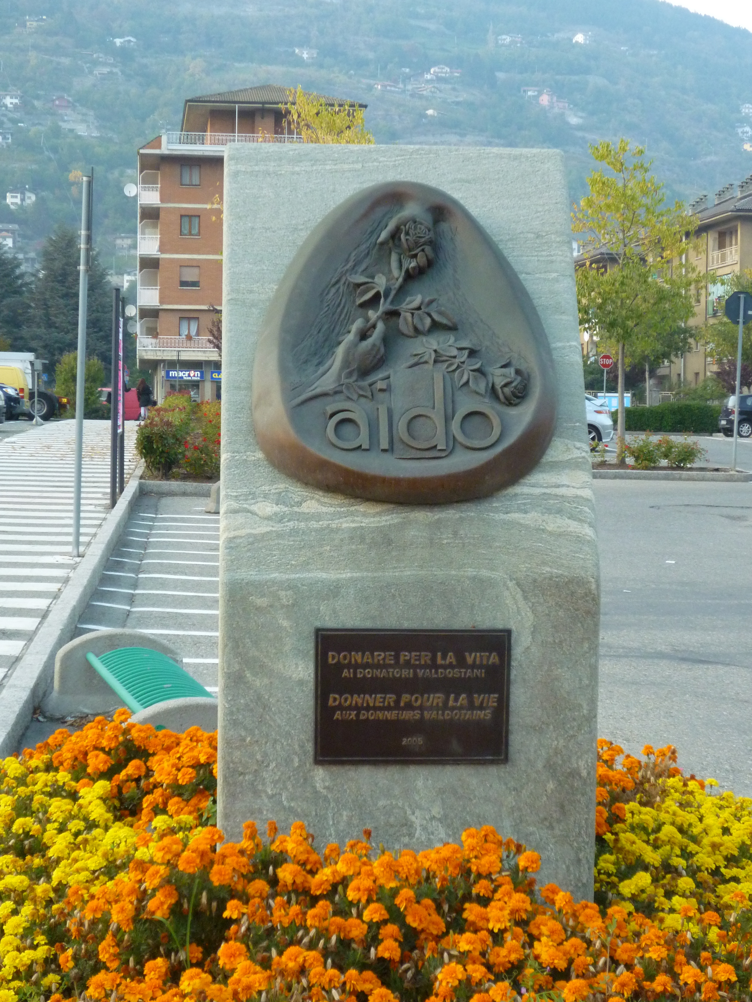 Sculpture dédiée aux donneurs d'organes valdôtains, place Ducler (Aoste - Italie)